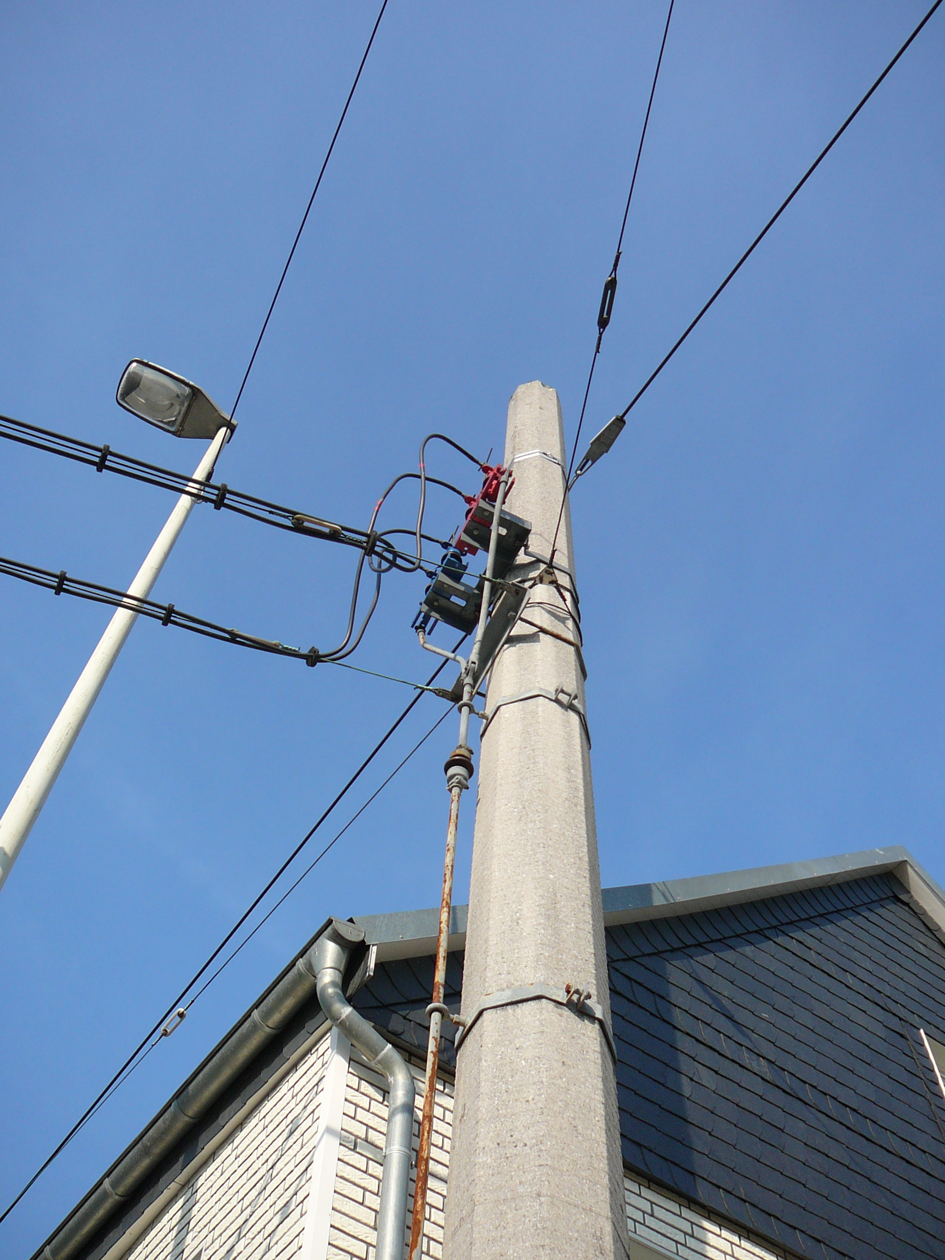 Gräfrather Straße, Wuppertal